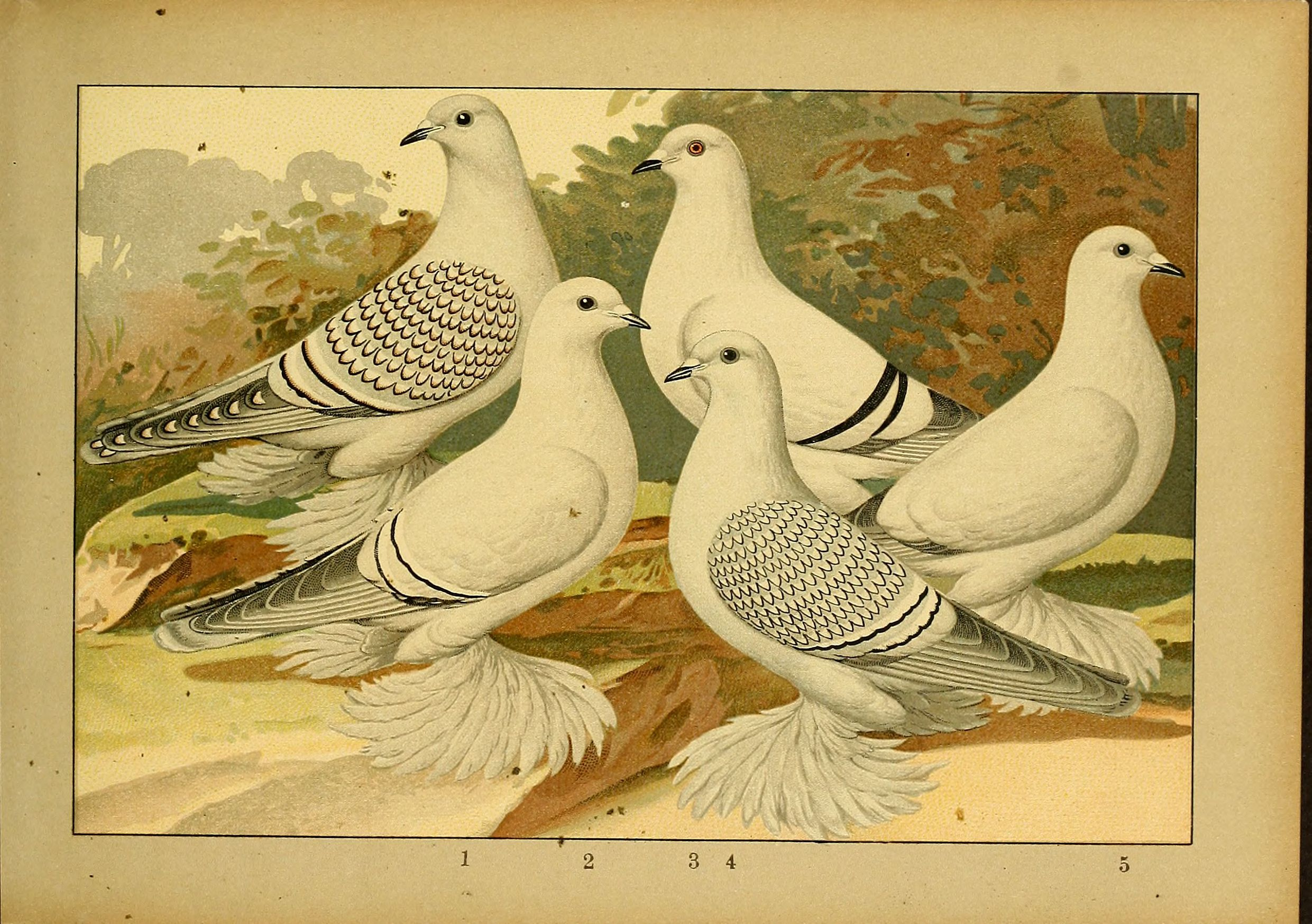 Deutsch